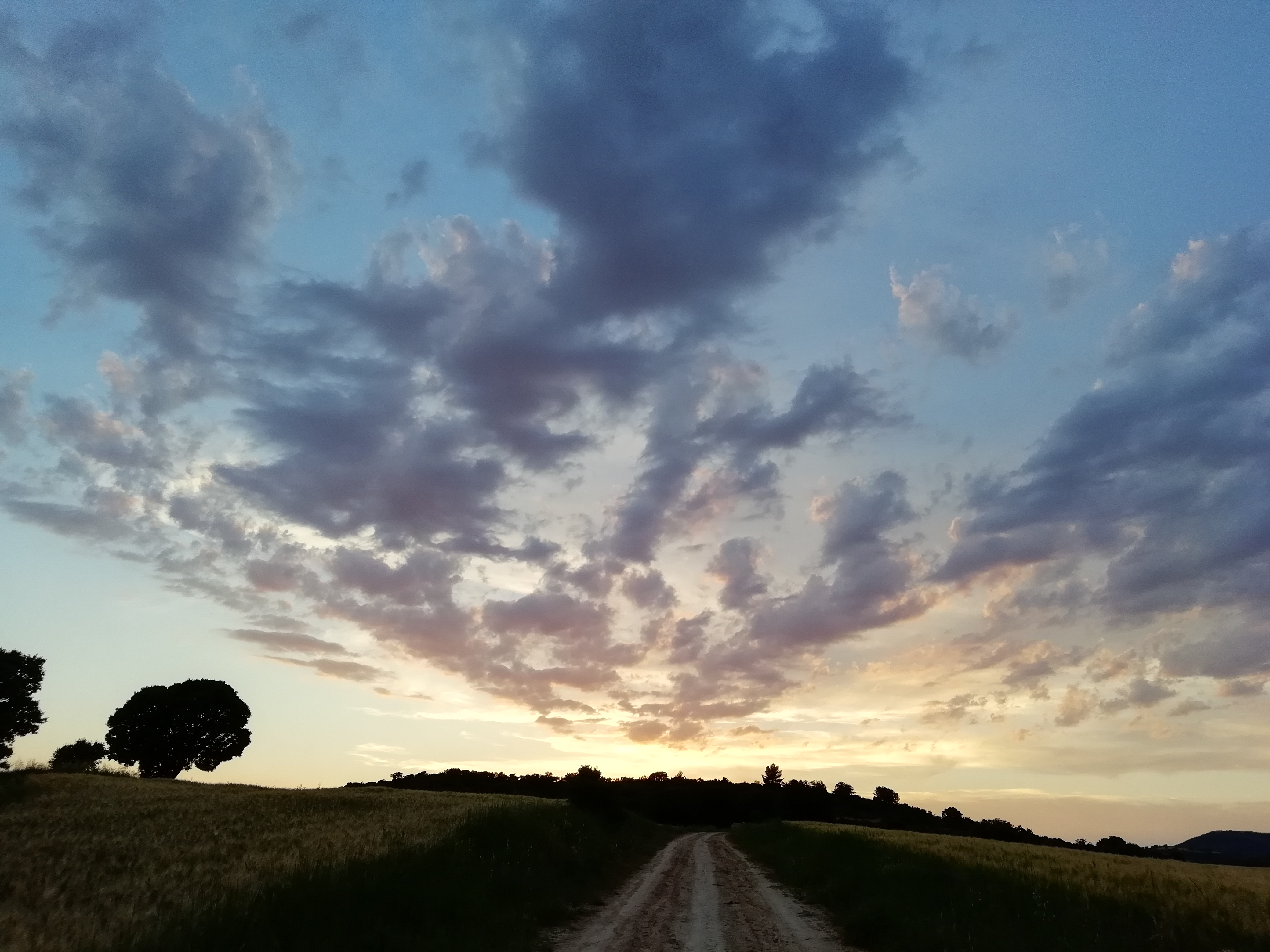 Camino cerca de la ermita